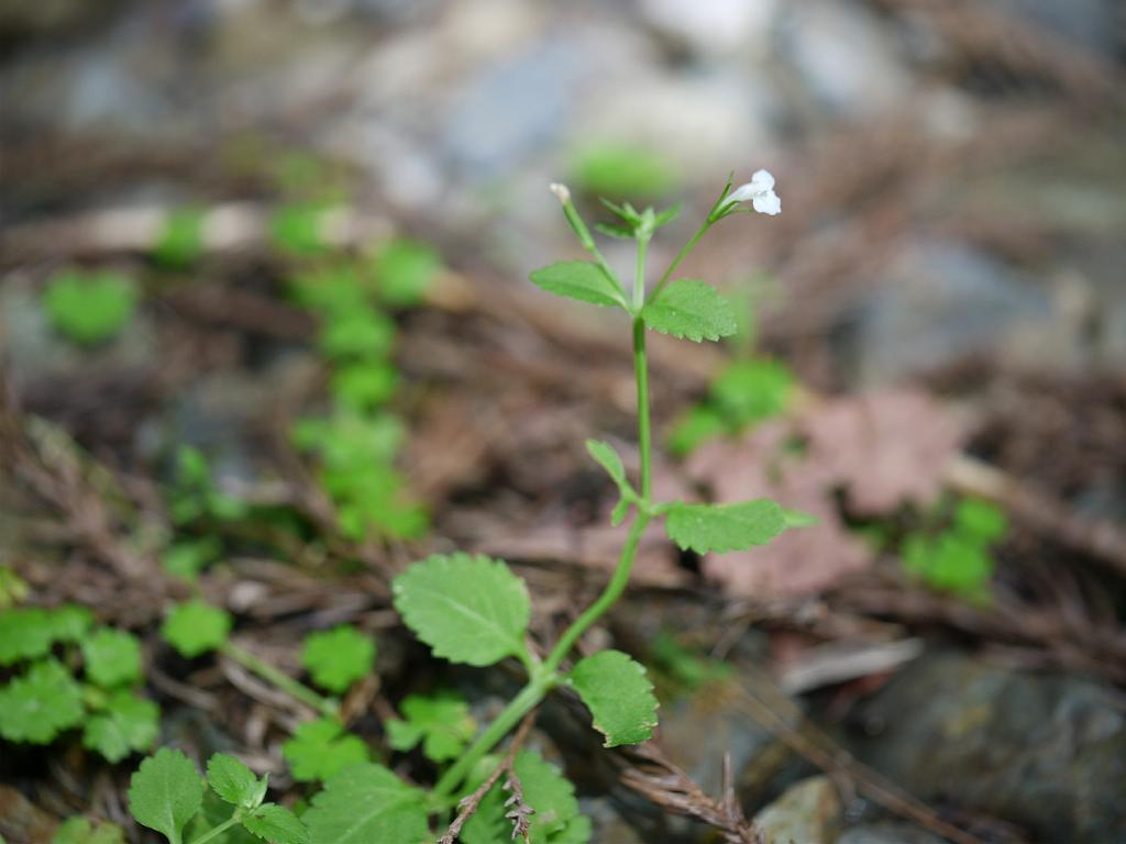 Lindernia setulosa：シソバウリクサ 2010/07/18 和歌山県田辺市：Tanabe City. Wakayama pref. Japan